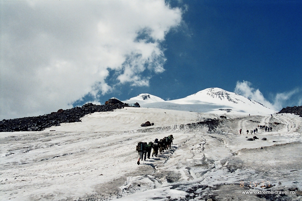 ascensiune Elbrus